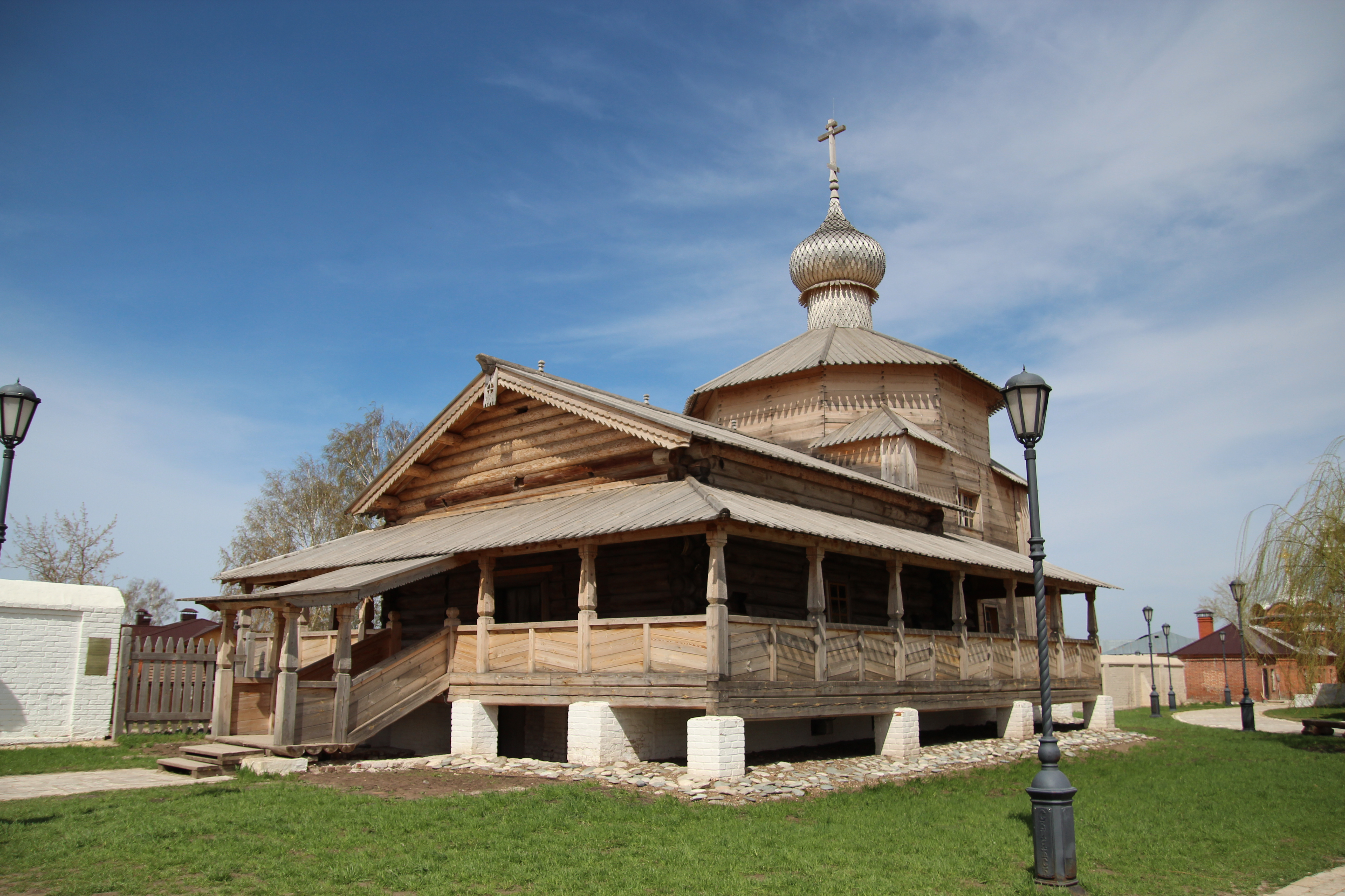 Троицкая церковь: Свияжск, Зеленодольский район, Татарстан